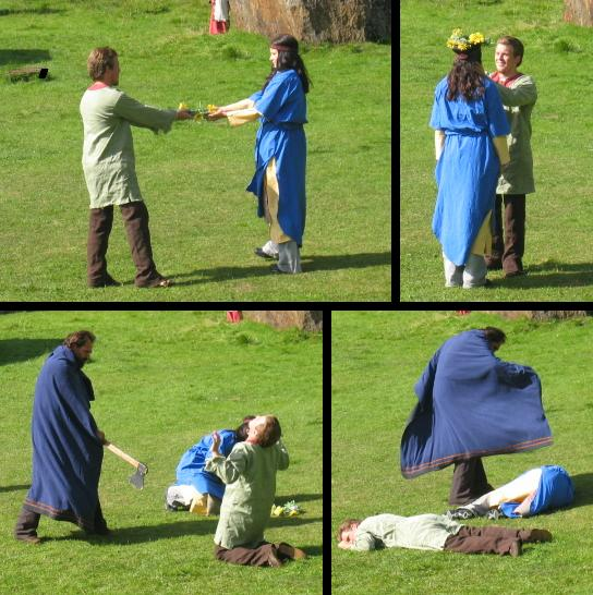 Steigen Sagaspill Paralellhistorien om unge Ulvhild (Oda) og gjellbryten Frode (Vegard) fra Skånland. Frode blir drept av Ulvhilds far, Kong Sigurd (Renè), før han sparker ulvhilds uføtte barn til døde. Ulvhild blir med det forvist til ura.